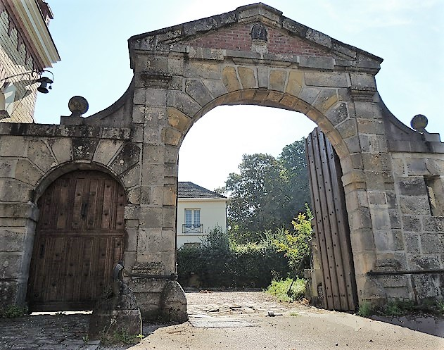 Portail en contre-jour avec fronton triangulaire en briques centré sur une niche avec statuette, pilastres doriques de chaque côté, porte piétonne à gauche et non à droite et deux boules de part et d'autre du fronton au dessus des murs. Section pavée devant le portail